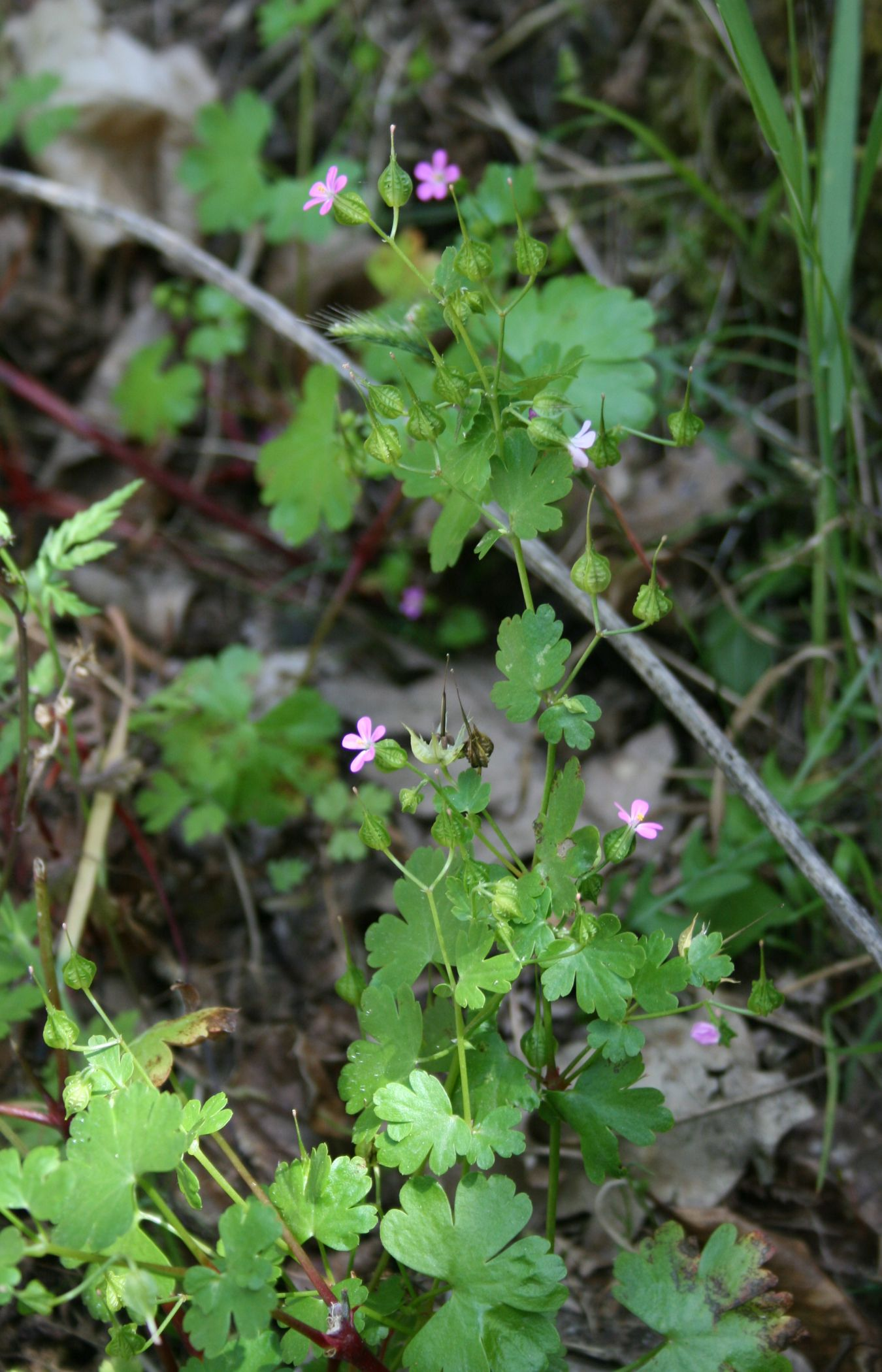 Geranium lucidum, Storchschnabelgewächse (Geraniaceae) - Italien/Italia/Italy: Kalabrien/Calabria, Prov. Reggio Calabria, Aspromonte, bei San Peri, SSE Scilla